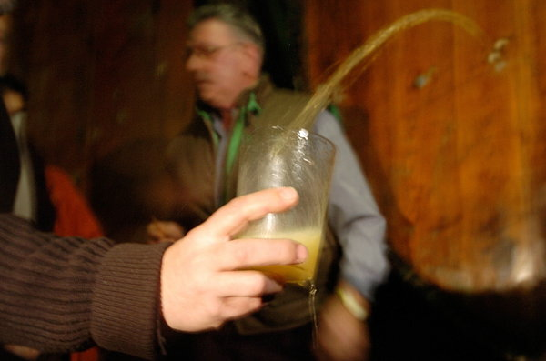 Sagardoa txotxetik.